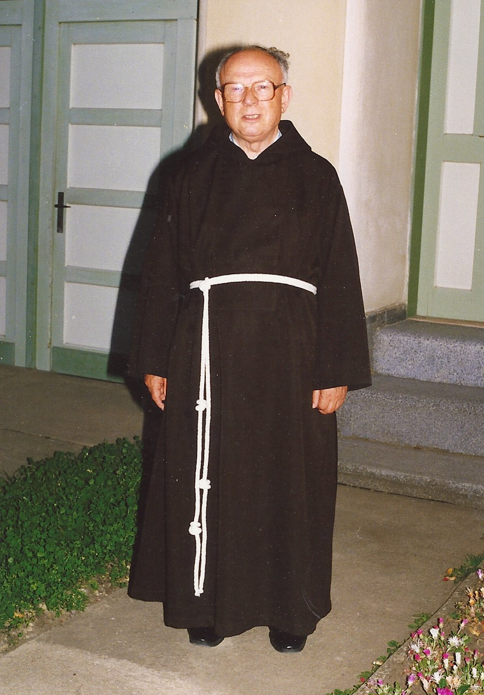 P. Juvenál Antonín Valíček v roce 1992